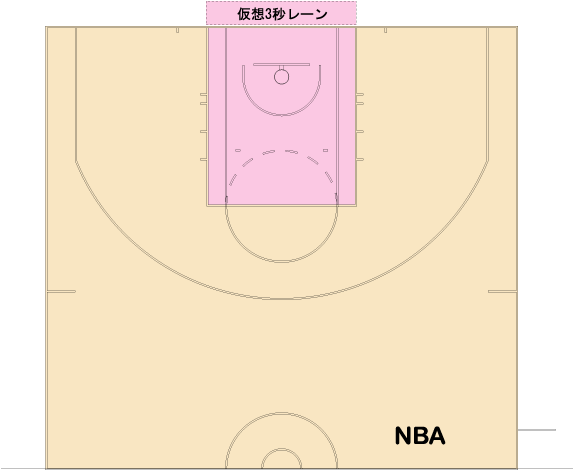 NBAで3秒ルールが拡大適応されるレーン 3second Rule Imaginry Lane (+4ft)